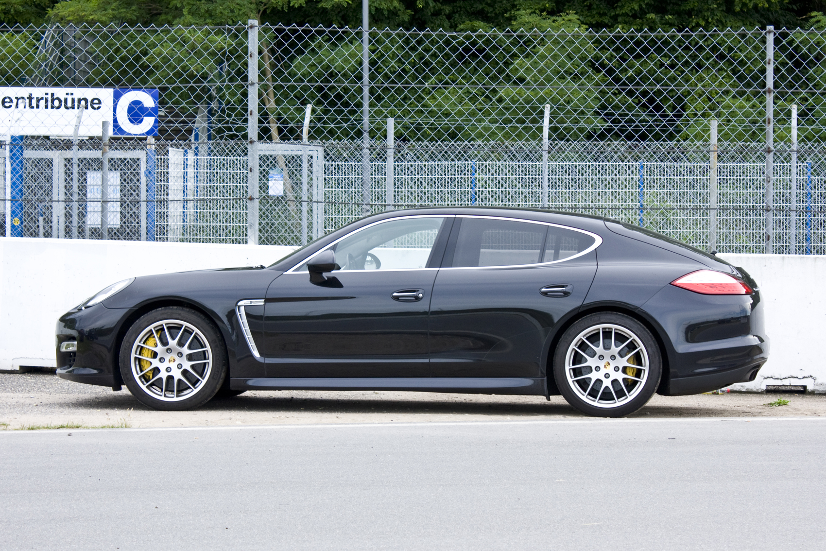 Porsche 970 Panamera Turbo